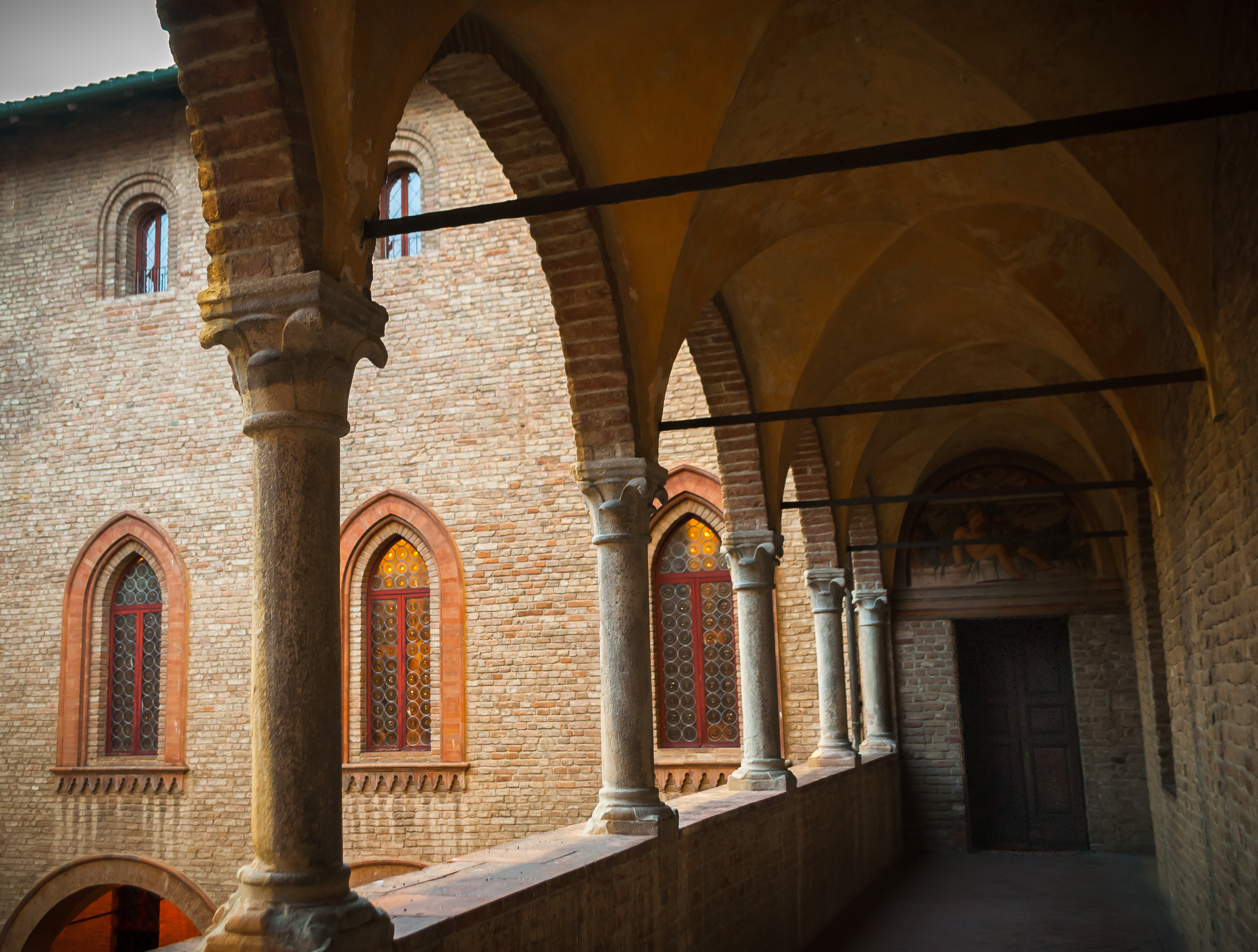 Rocca Sanvitale di Fontanellato This is a photo of a monument which is part of cultural heritage of Italy.